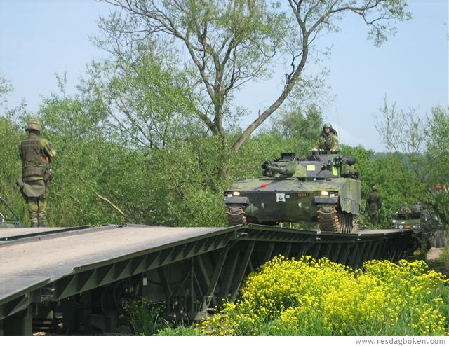 Krigsbro 5 (KB5) Trafikerad av Stridsfordon 90